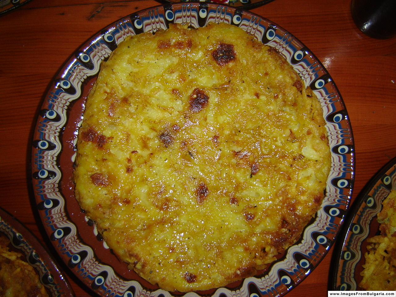 Patatnik, traditional bulgarian food